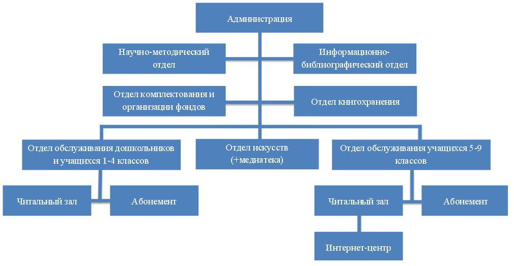 Структура детской библиотеки им.В.Н.Орлова